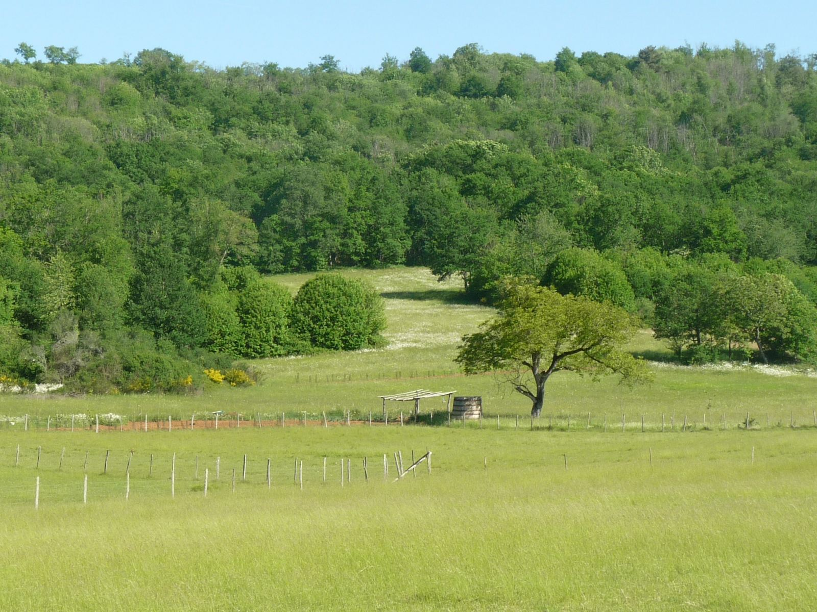 vue vers le massif de l'Arbre sur la commune d'Orgedeuil près de Fontéchevade, Charente, France